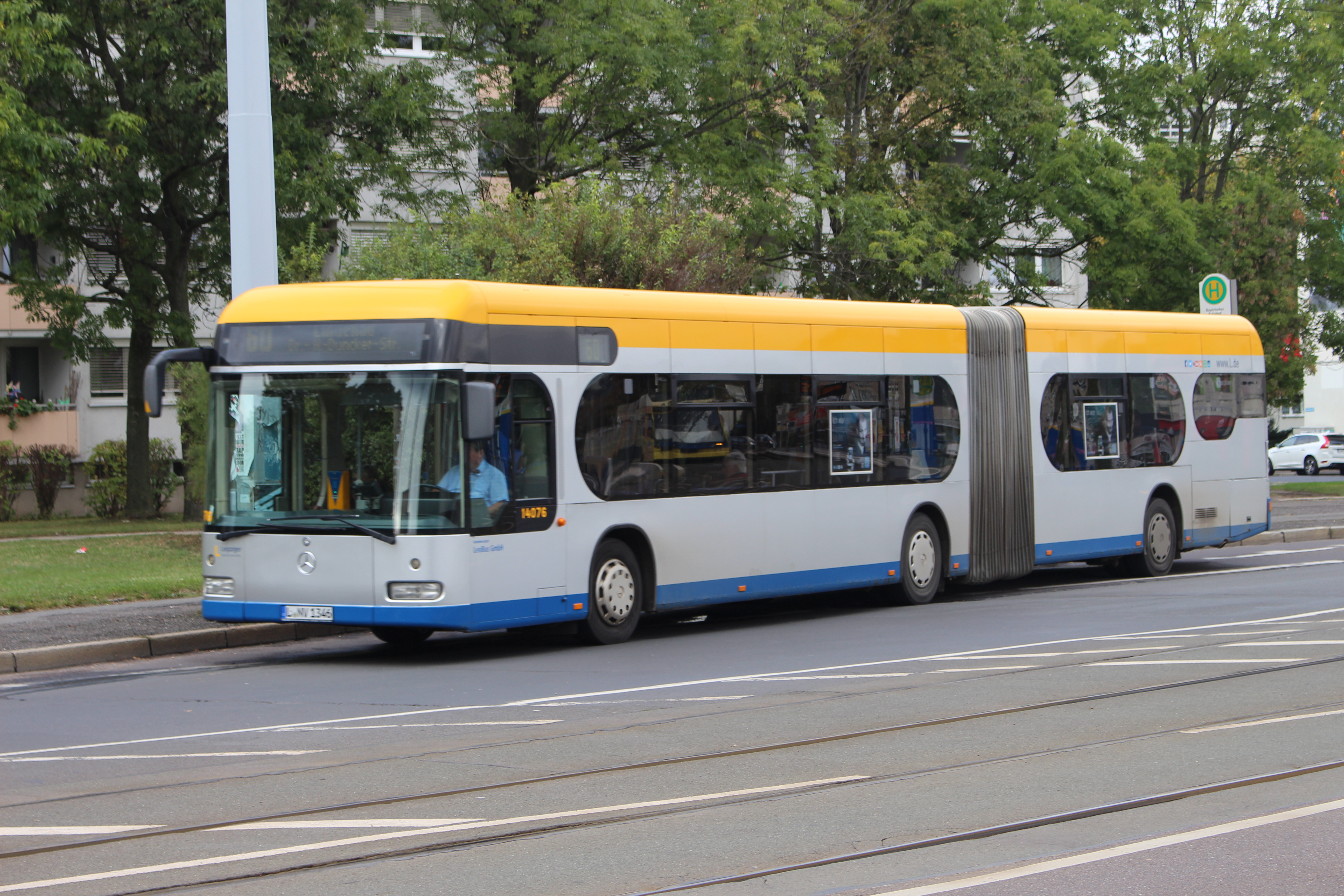 Leipziger Bus, Linie 60